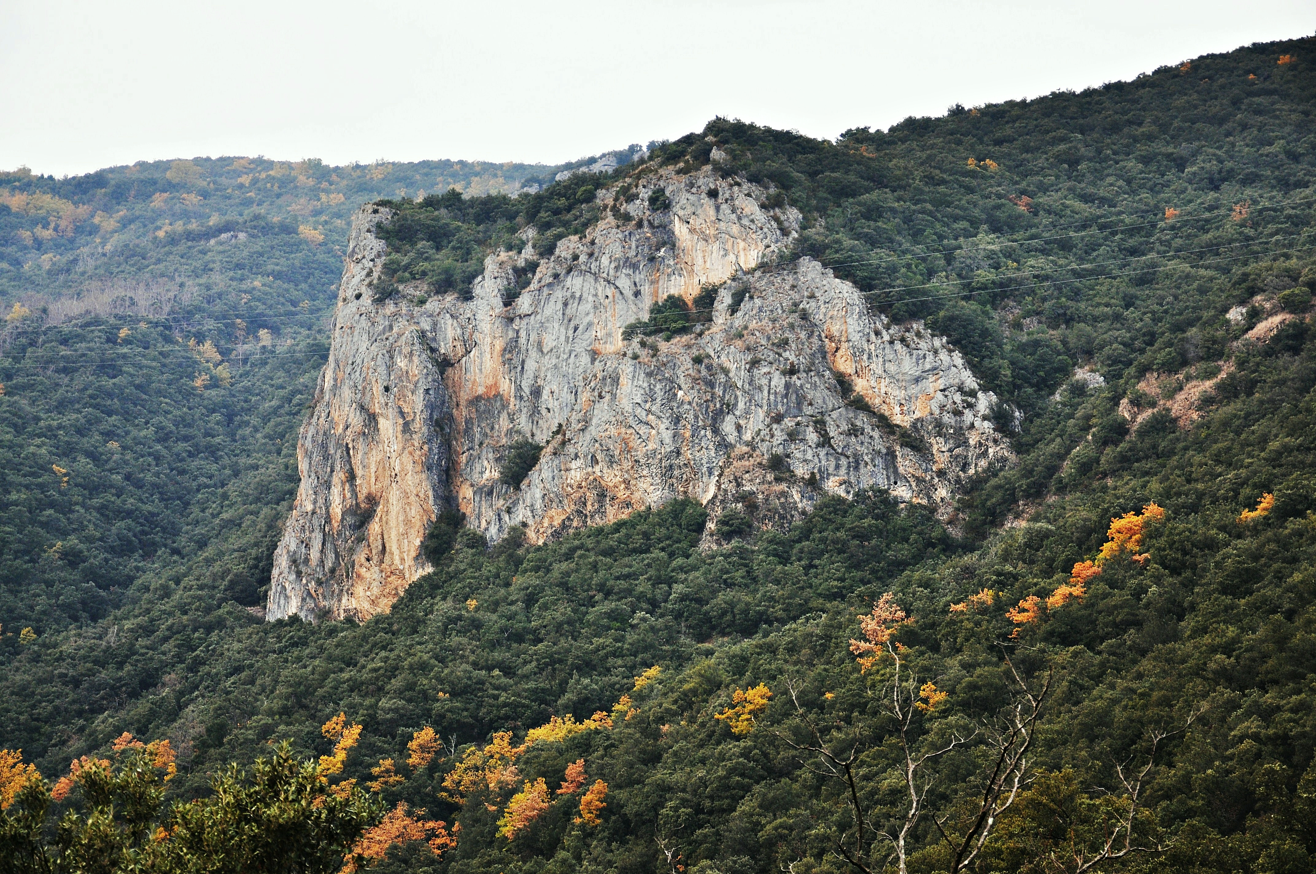 cataluña norte